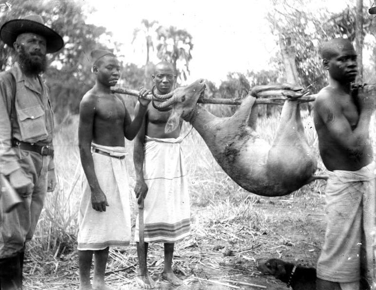 Heimkehr von der Jagd